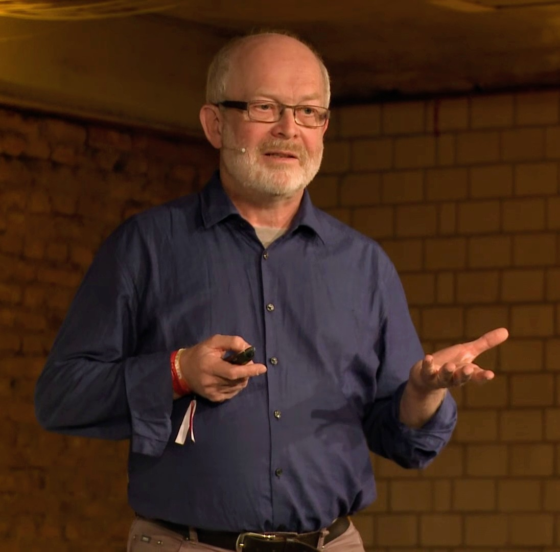 (Tonspur in dieser Aufnahme beginnt erst ab 2:45 min) Find out more at: In seinem Roman "The Fountains of Paradise " hat Arthur C. Clarke 1979 die phantastische Vision des Weltraumaufzuges aufgezeigt: Statt aufwendiger und teurer Raketen befördern Aufzugskabinen Astronauten und Nutzlasten ins All. Neue technische Entwicklungen in der Chemie und der Raumfahrttechnik bringen diese Vision in erreichbare Nähe. Rainer Kresken Creative Commons Attribution-ShareAlike 3.0 Germany (CC BY-SA 3.0 DE)